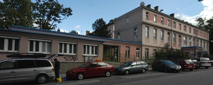 Gottfried von Preyer´sches Kinderspital in Wien-Favoriten: Haupteingang